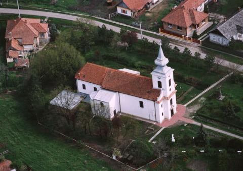 Jánoshida, Hungary, aerialphorography. Keresztelő Szent János római katolikus templom